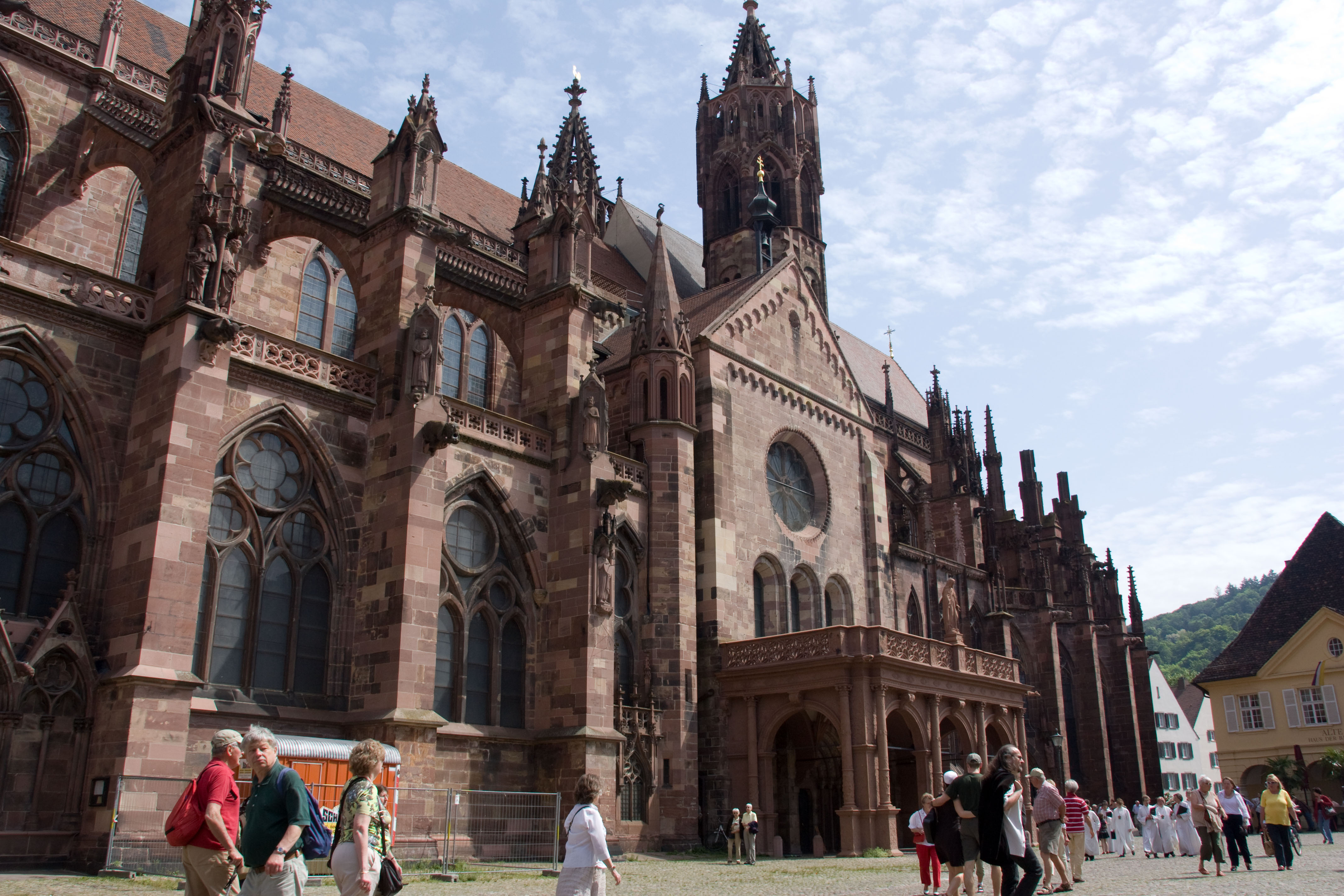 Vue de Freiburg im Breisgau / Allemagne